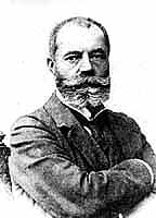 Puskás Tivadar ( 1844 – 1893), a távközlés magyar úttörője, a a telefonhírmondó feltalálója.